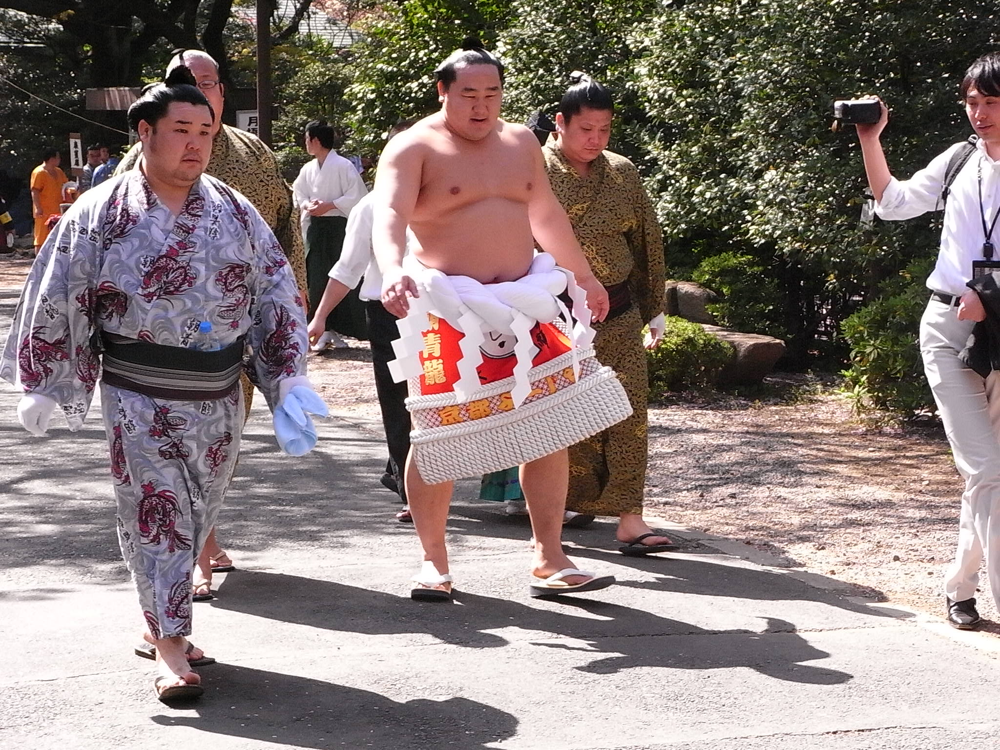 朝青龍明徳